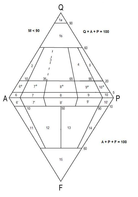 Diagram QAPF z ponumerowanymi polami odpowiadającym poszczególnym skałom głębinowym